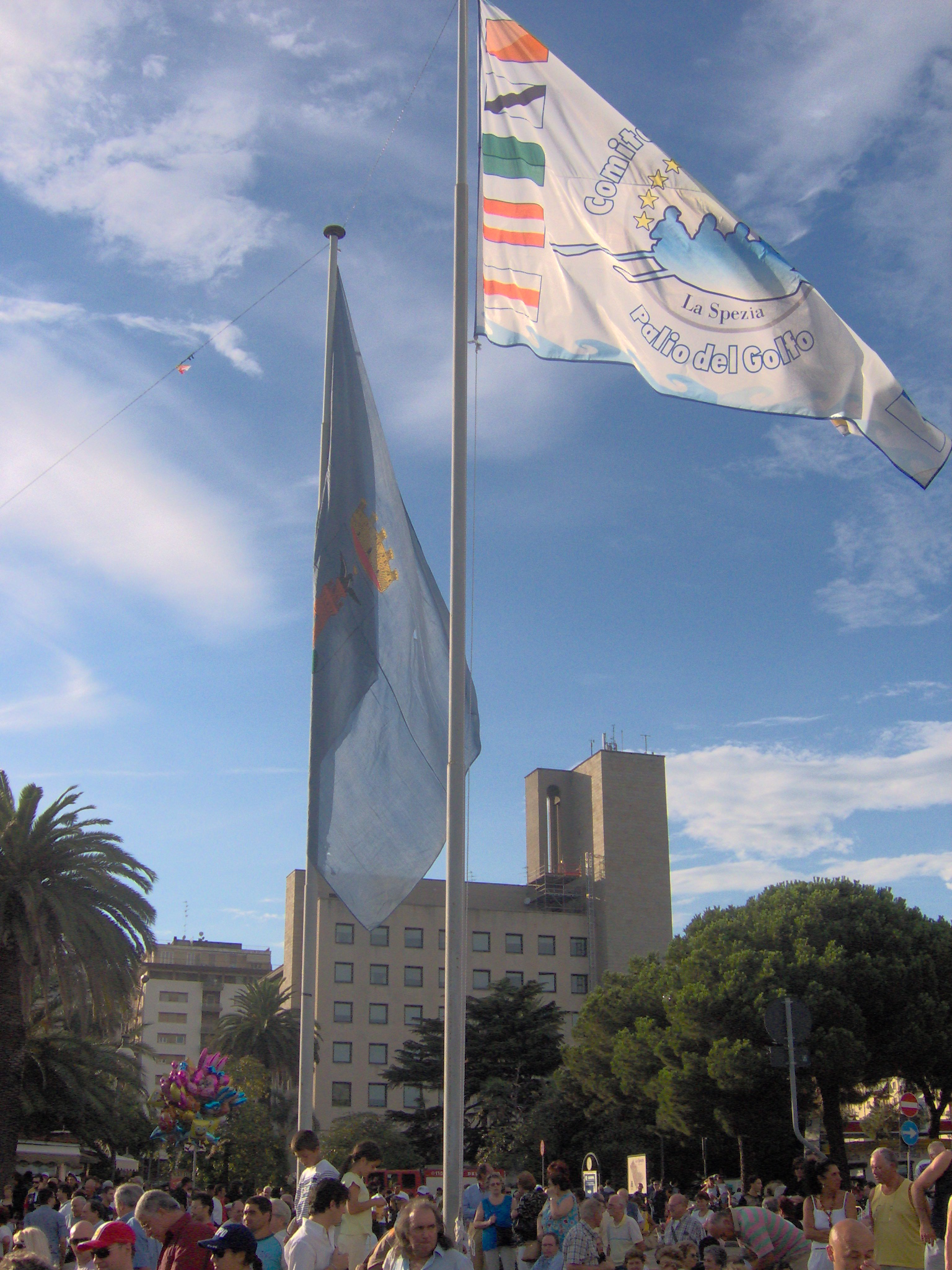 La Spezia - Le bandiere della festa del mare